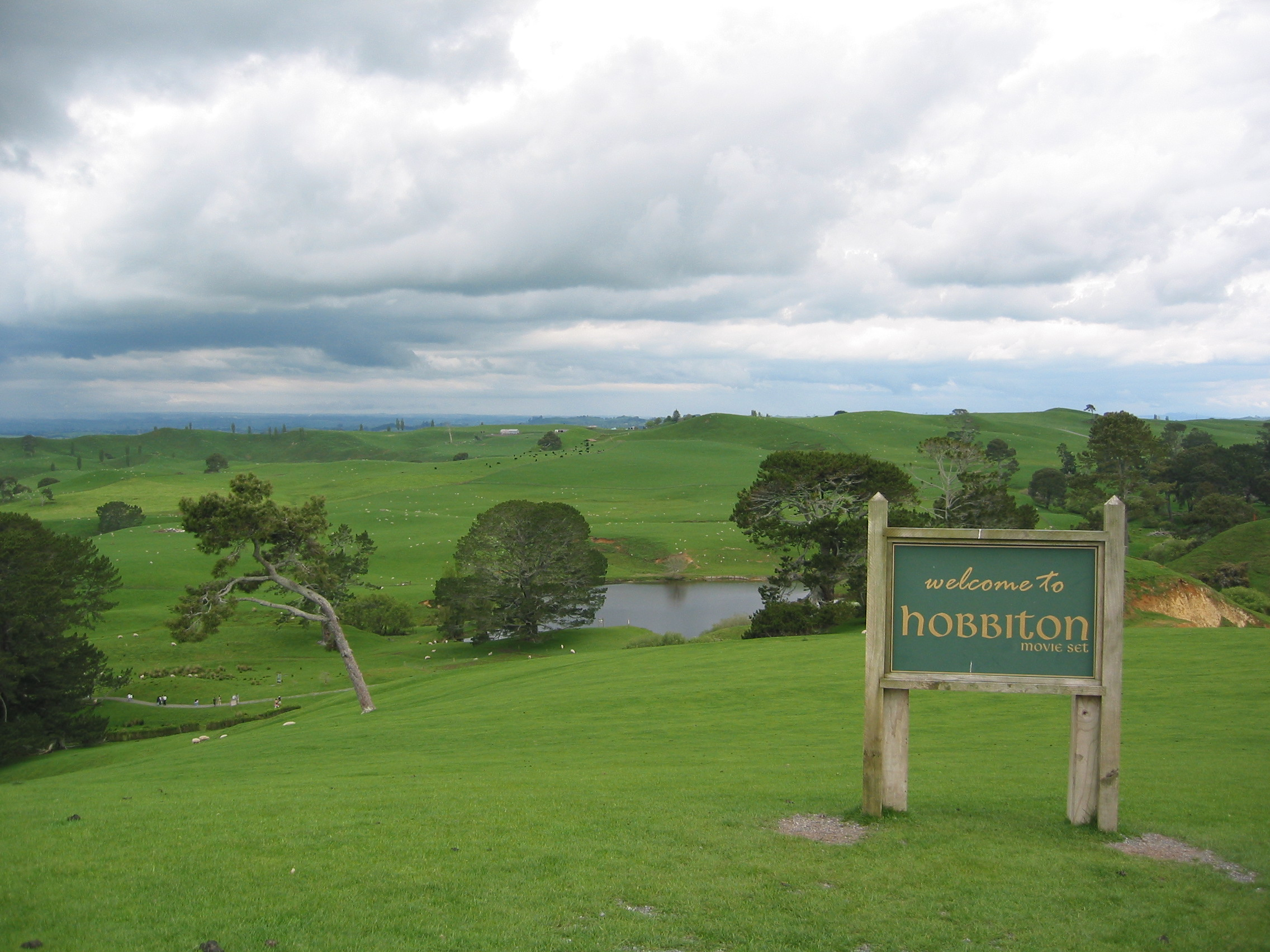 Eigen foto genomen tijdens onze vakantie in 2004